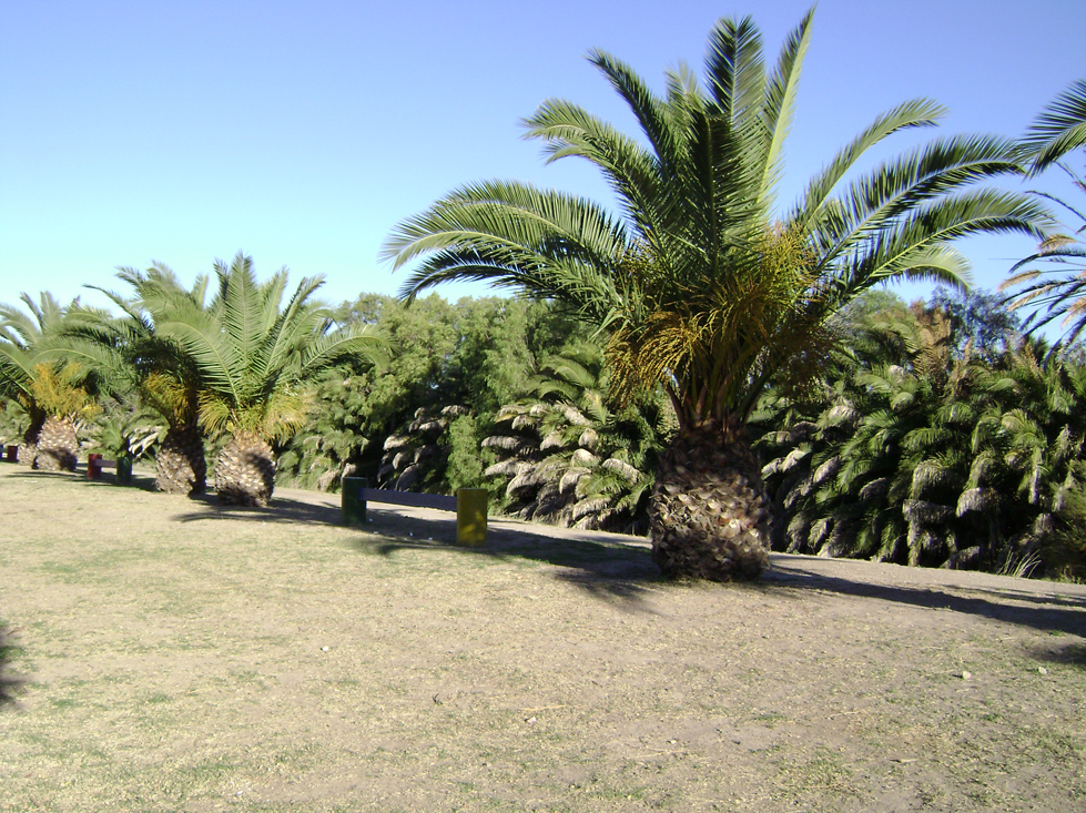 Forestación en el paseo del canal "Cuatreros"